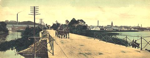 Viborgbroen, Silkeborg